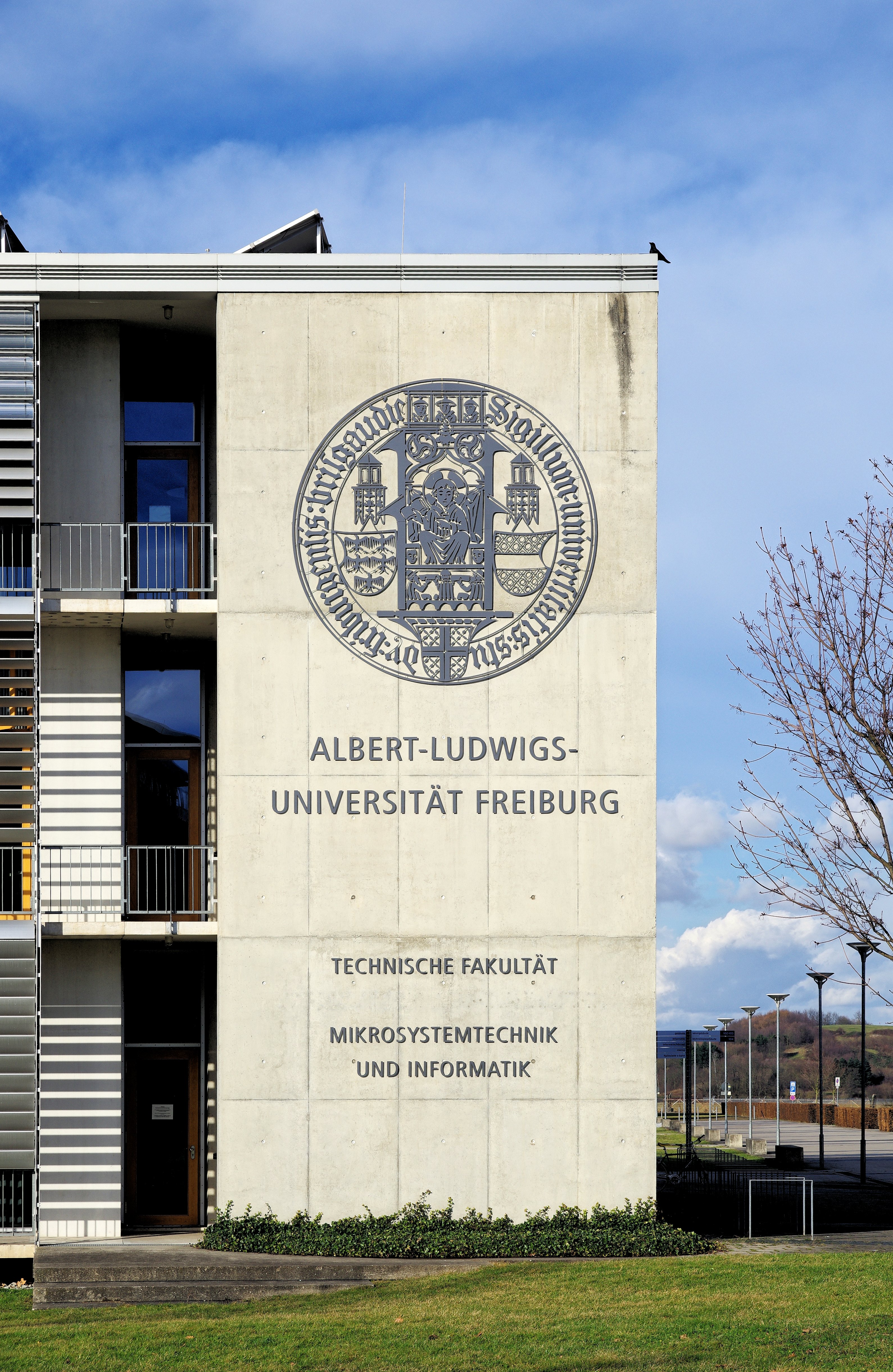 Eingang zur 15. Fakultät, unter anderem Mikrosystemtechnik